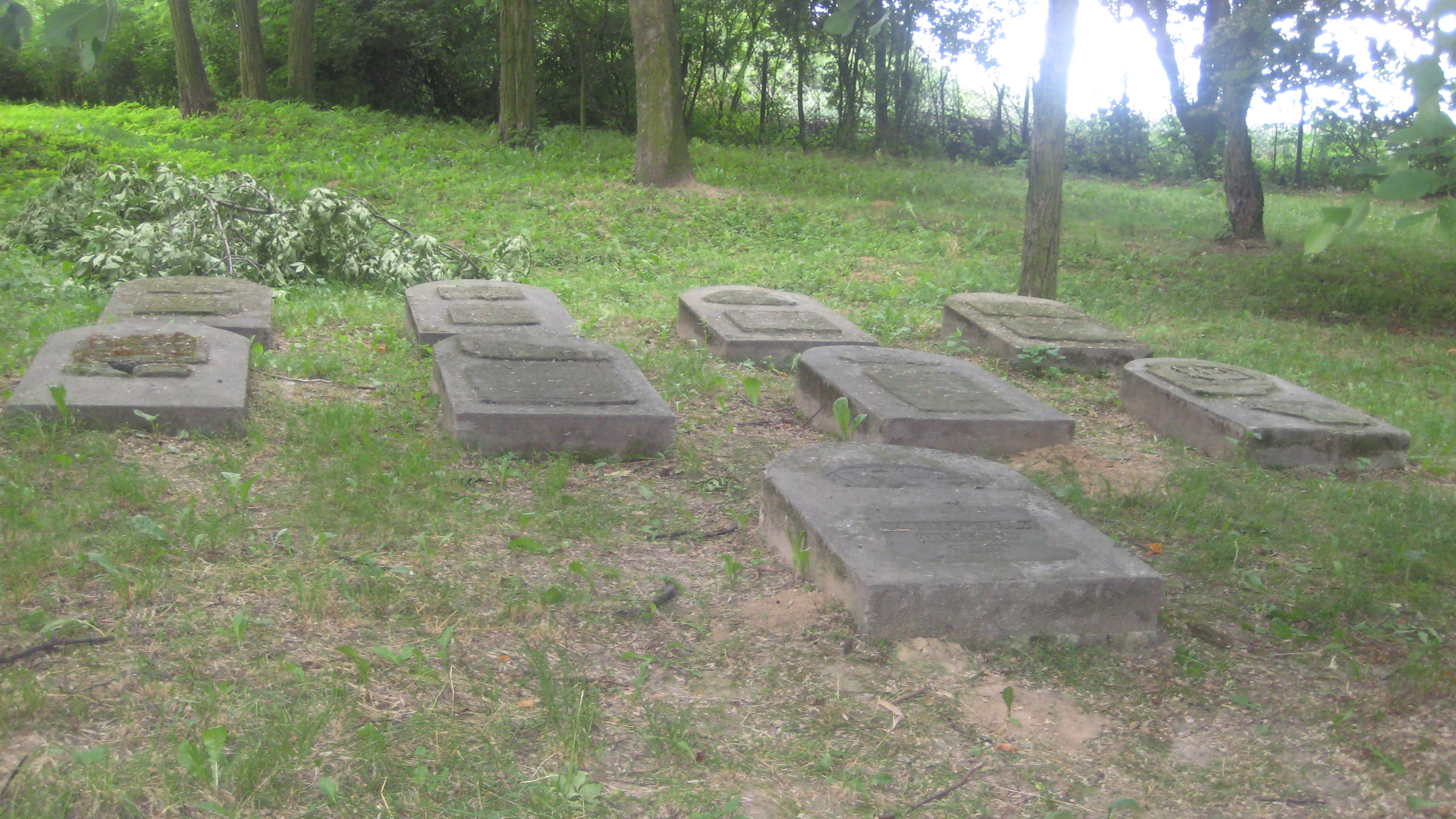 Opatów, ul. Kopernika - lapidarium, na terenie dawnego cmentarza żydowskiego, obecnie park miejski